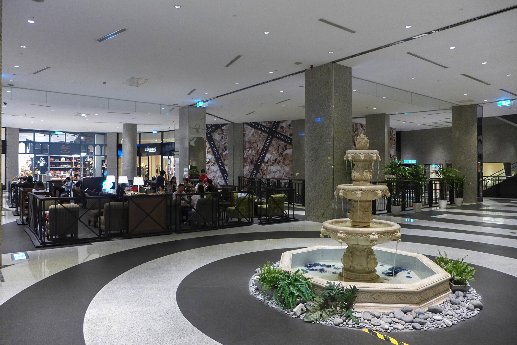 Bellavita